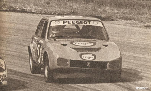 Osvaldo Abel "Cocho" López en el TC2000 de 1979, sobre un Peugeot 504.